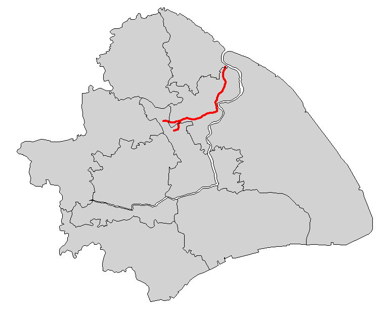 上海轨道交通10号线简图 本地图的底图不表示上海市全部所辖区域 因版面关系，上海市所辖之崇明岛、长兴岛等与本线路无关的离岛未在本图中表示。